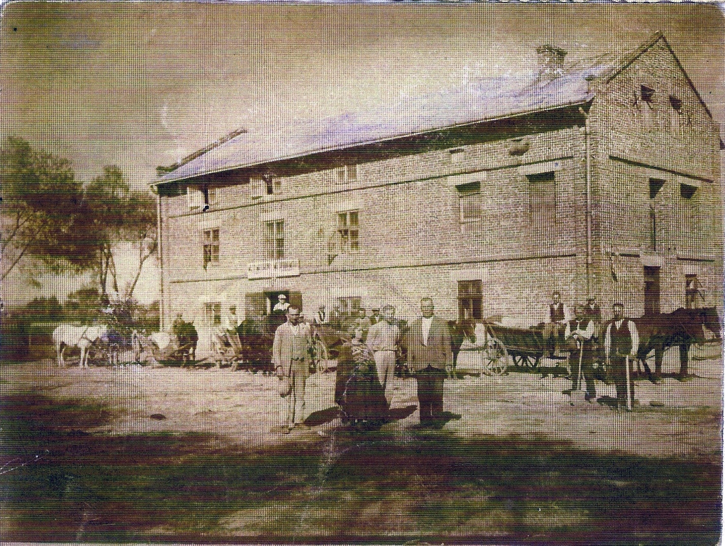 Млин в с. Кам'янопіль, Пустомитівського р-ну Знаходився за сучасною будівлею магазину. Від нього залишились лише 4-ри залізні сваї